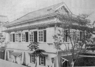 石坂文庫外觀，攝於臺灣日治時代。